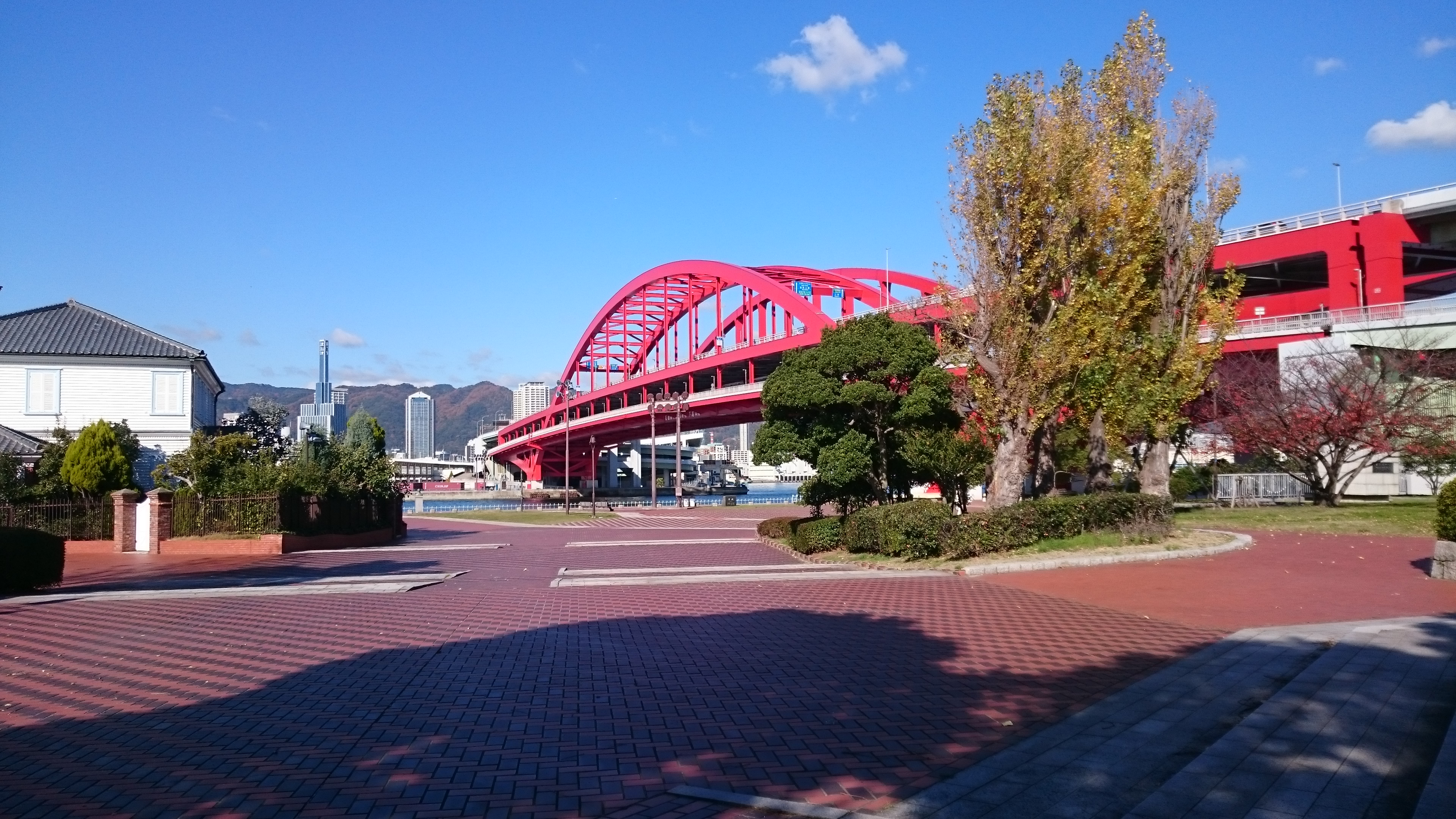 ポートアイランド北公園を南端から神戸大橋方を望む